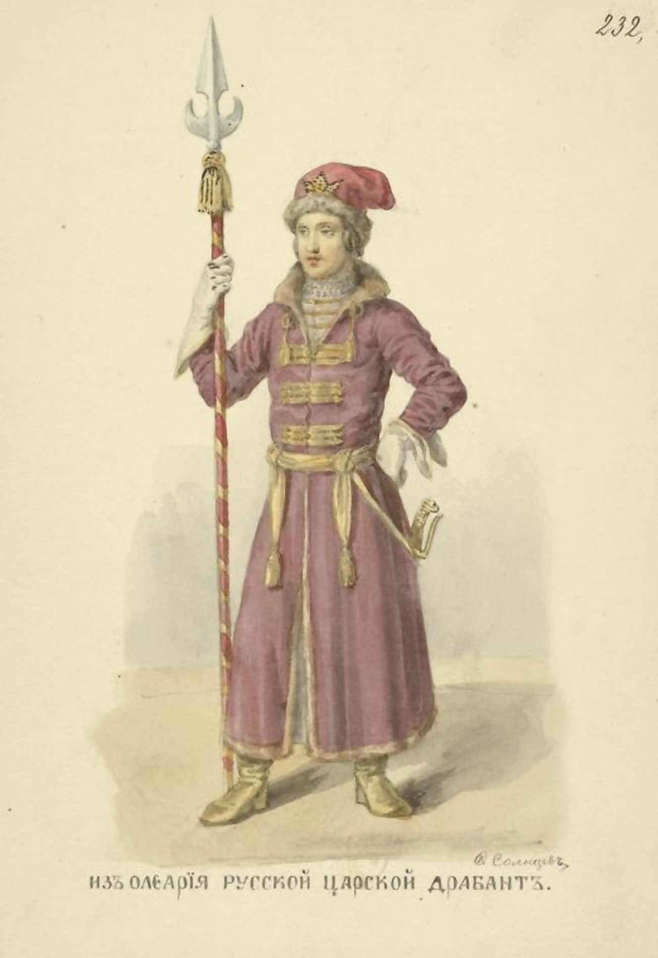 Из Олеария. Драбант царской русской армии.